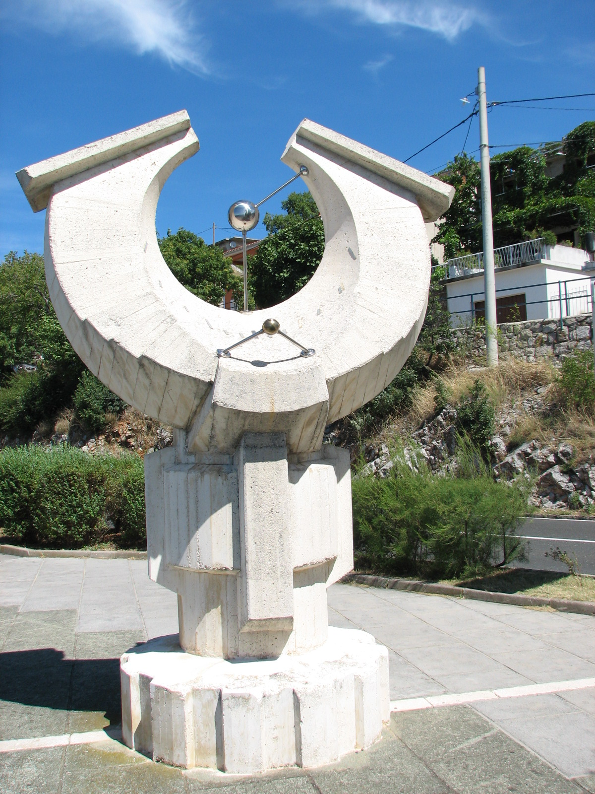 Horvátország, Zengg város, napóra szobor, ami 5000km-re van az Északi-sarktól és az Egyenlítőtől is.